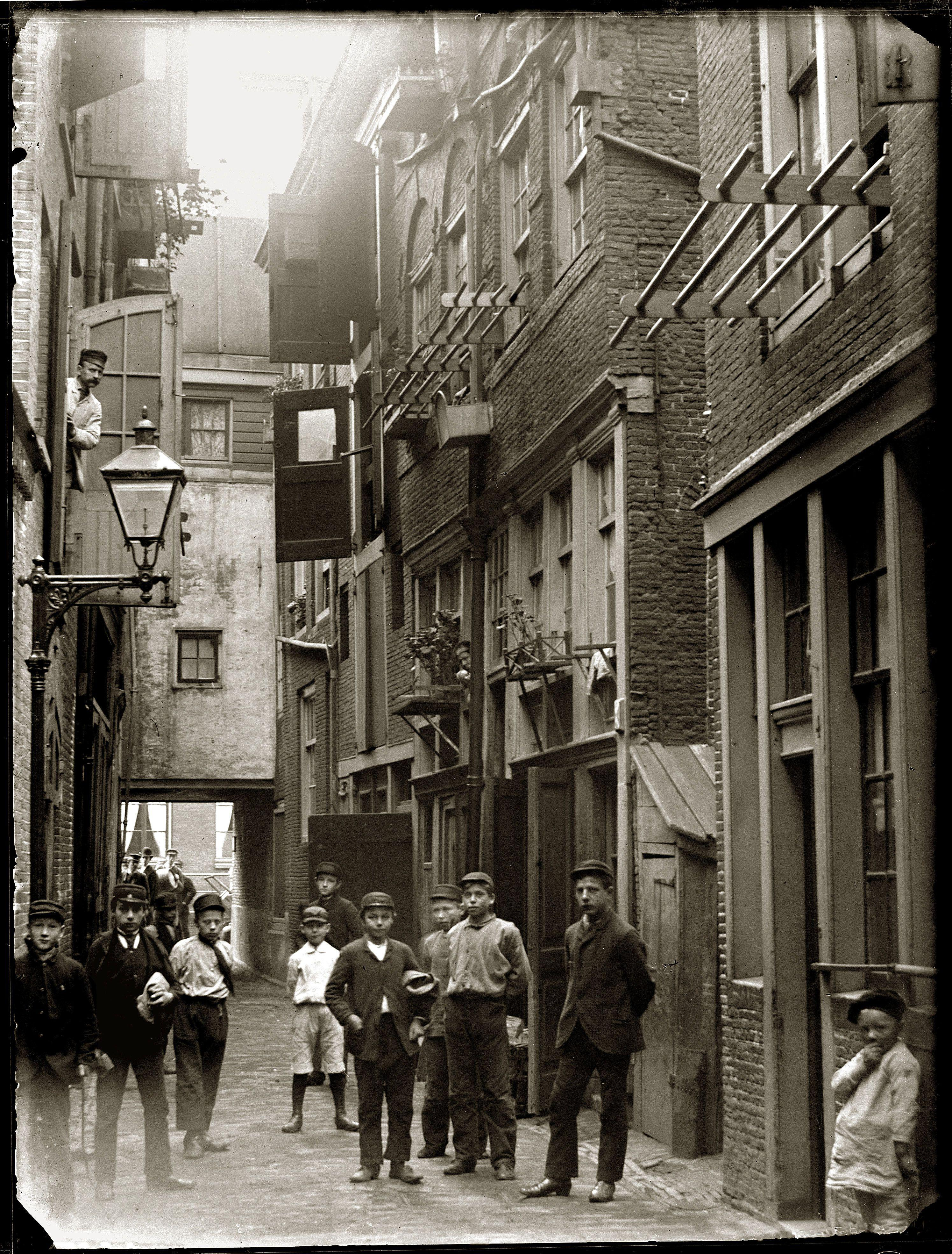 Gebed zonder End. Foto. Amsterdam, Stadsarchief Amsterdam.